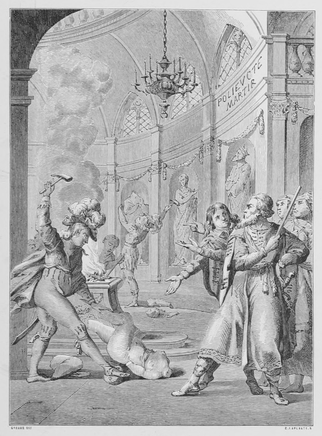 Plate page 11 of File:Corneille, Pierre - Œuvres, Marty-Laveaux, 1862, album.djvu